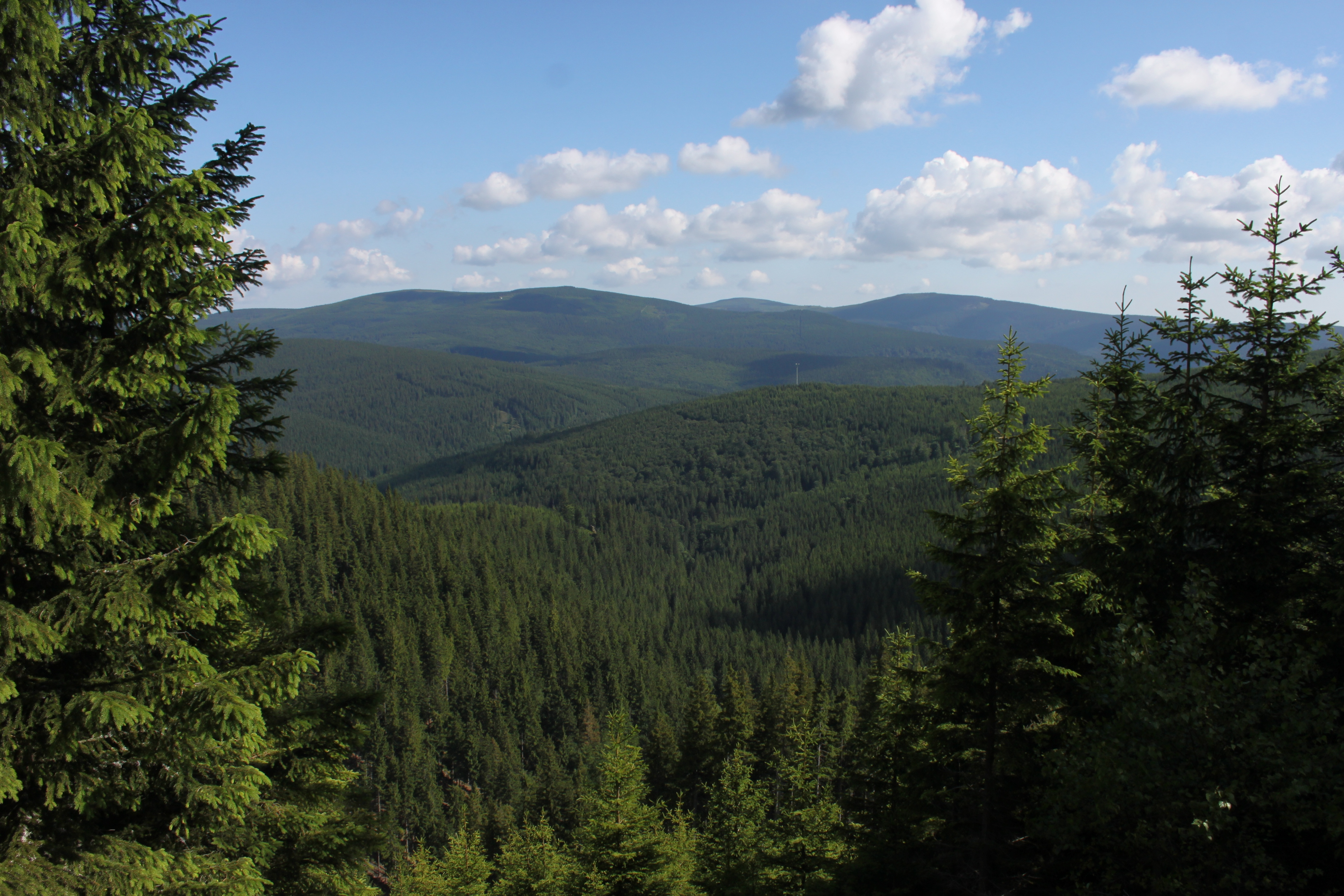 Medvědská hornatina - na fotce jsou její nejvyšší hory: zleva dvojvrchol Jelení loučky (1205 m) a Černý vrch (1200 m), v pozadí Orlík (1204 m) a vpravo Medvědí vrch (1216 m), nejvyšší vrchol, který dal této části jméno.